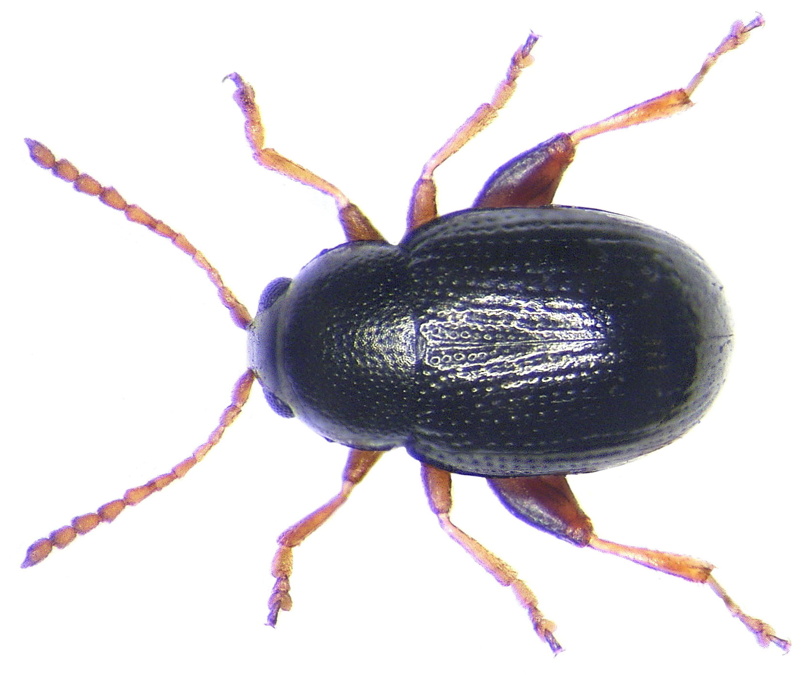 Batophila rubi (Paykull, 1977) Familie: Chrysomelidae Groesse: 1,4-2 mm Verbreitung: Europa Ökologie:an Rubus- und Fragaria-Arten Fundort: Germania, Bayern, Oberfranken, Bad Steben leg.det. U.Schmidt, 2005 Photo: U.Schmidt, 2005